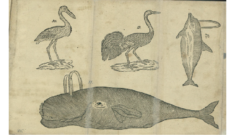 Последняя страница "Рыбного букваря"